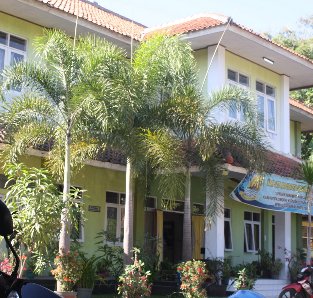 Puskesmas Sumber, Jalan Pangeran Kejaksan, Kecamatan Sumber, Kabupaten Cirebon- Jawa Barat. Date 28 Juli 2012 Foto Jie73